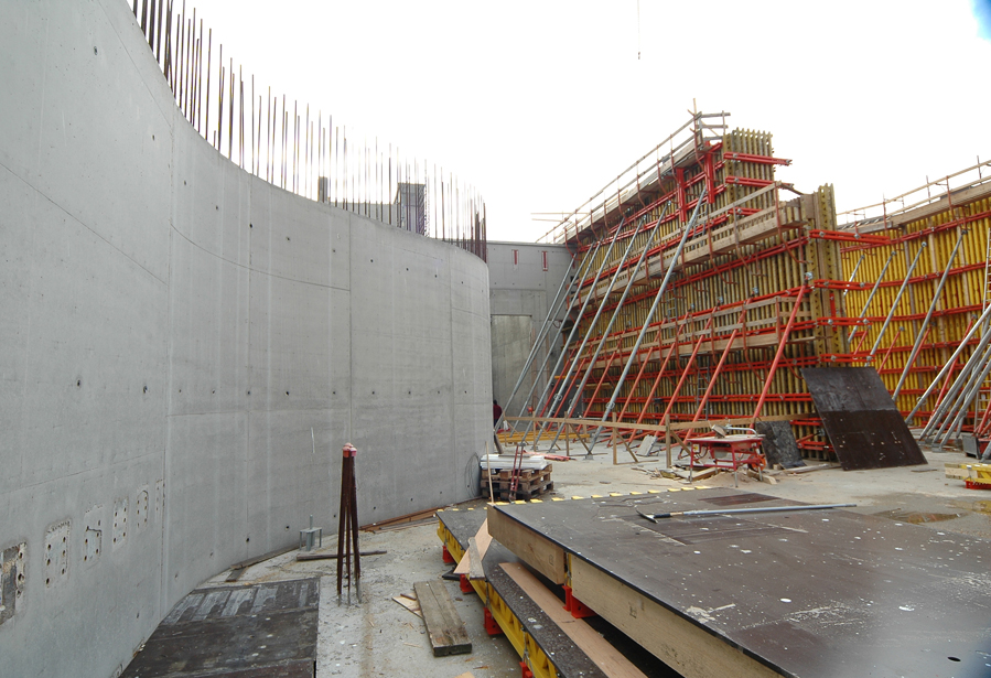 Roberto Galasso - DARC